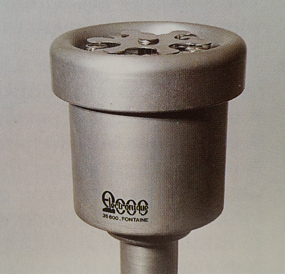 Détecteur d'orages Electronique 2000